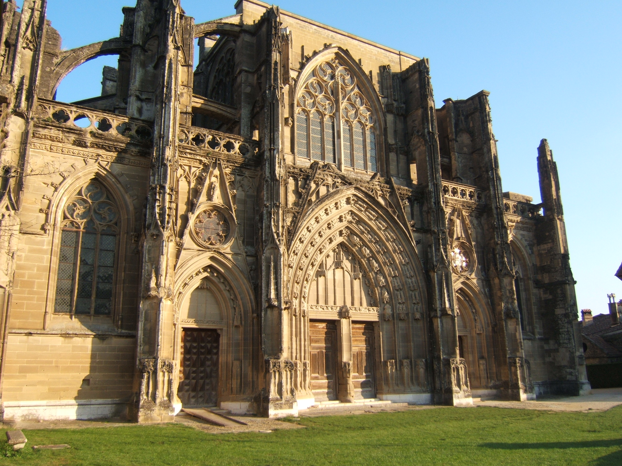 Portail de l'Eglise Abbatiale de St Antoine l'Abbaye